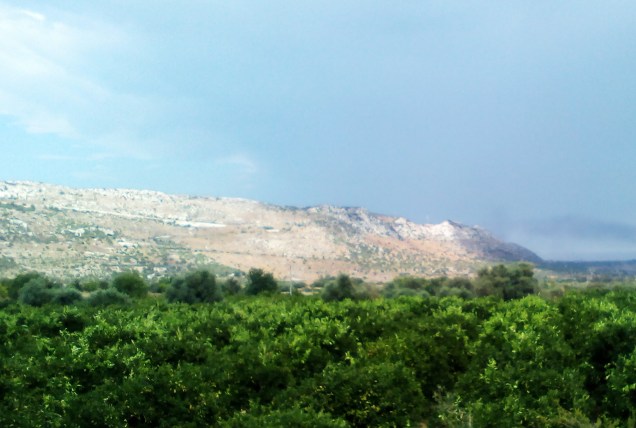 Monte Climiti visto da Solarino (SR)